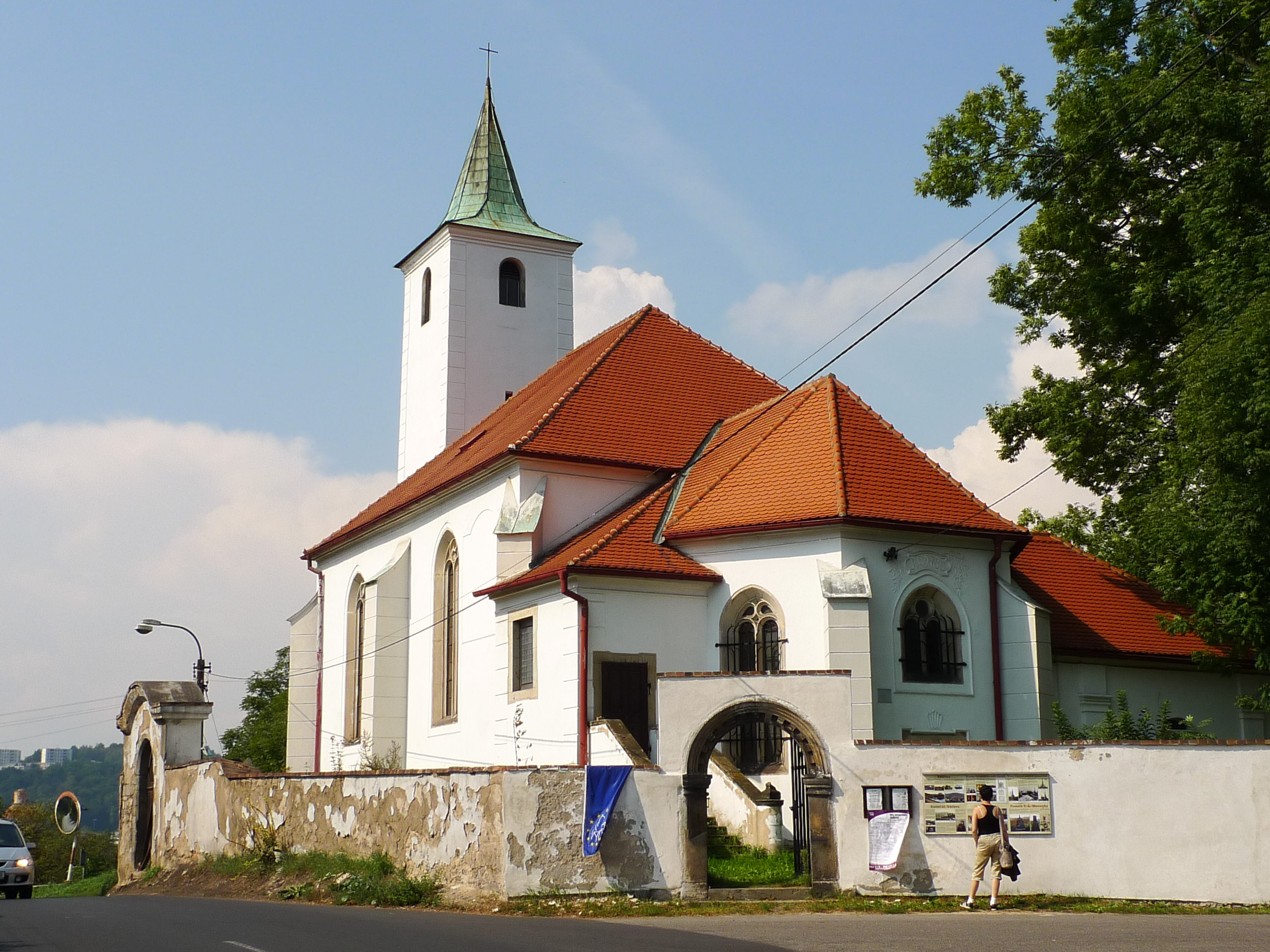 Kostel svatého Václava, Valtířov.